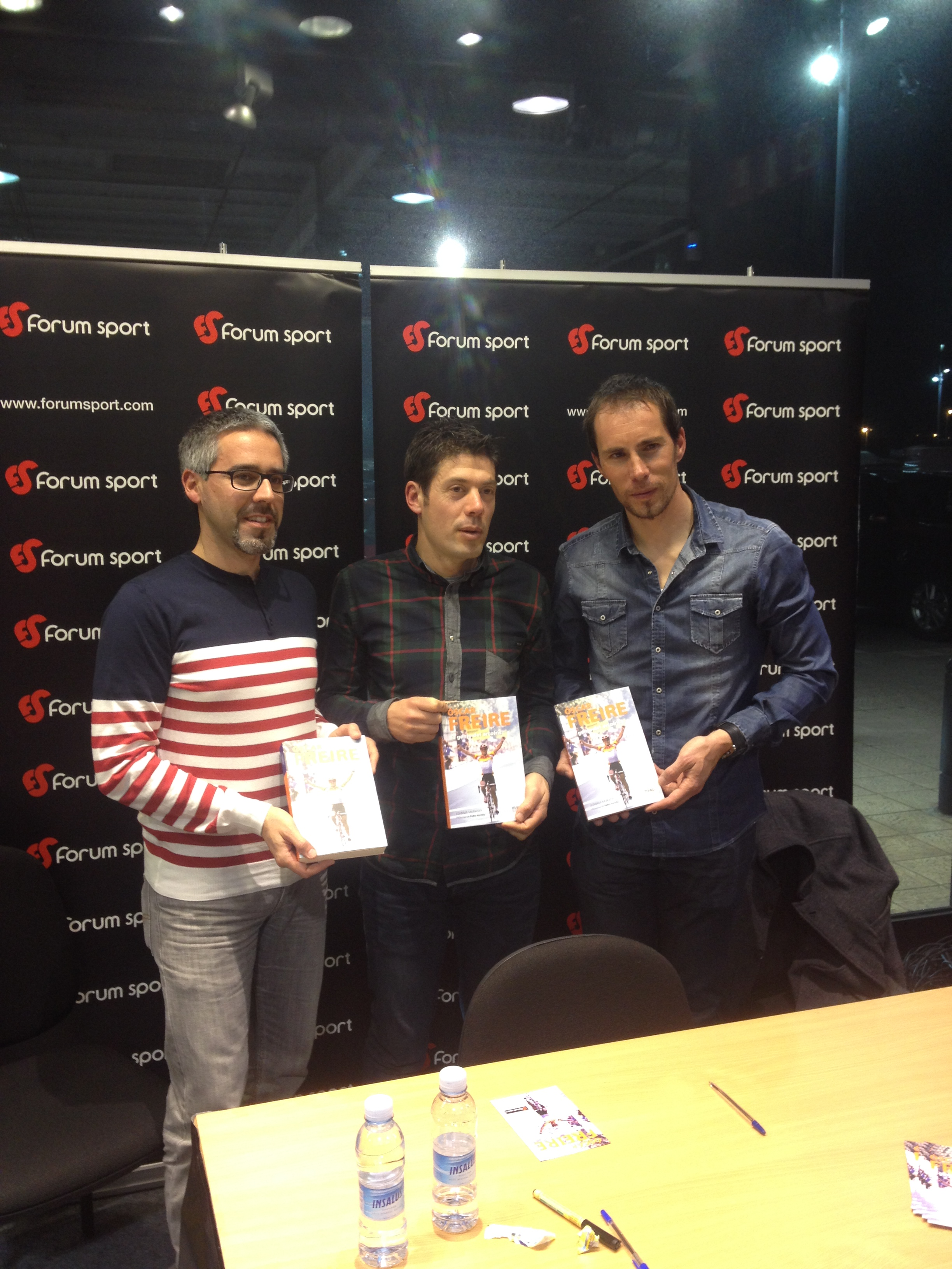 Óscar Freire, acompañado de Juanma Muraday y de Pedro Horrillo, presentando la biografía de Freire